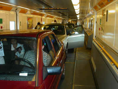 eigen foto, augustus 2003